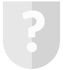 Ersatzwappen für Formatvorlage und Stadtartikel mit fehlendem Wappen.